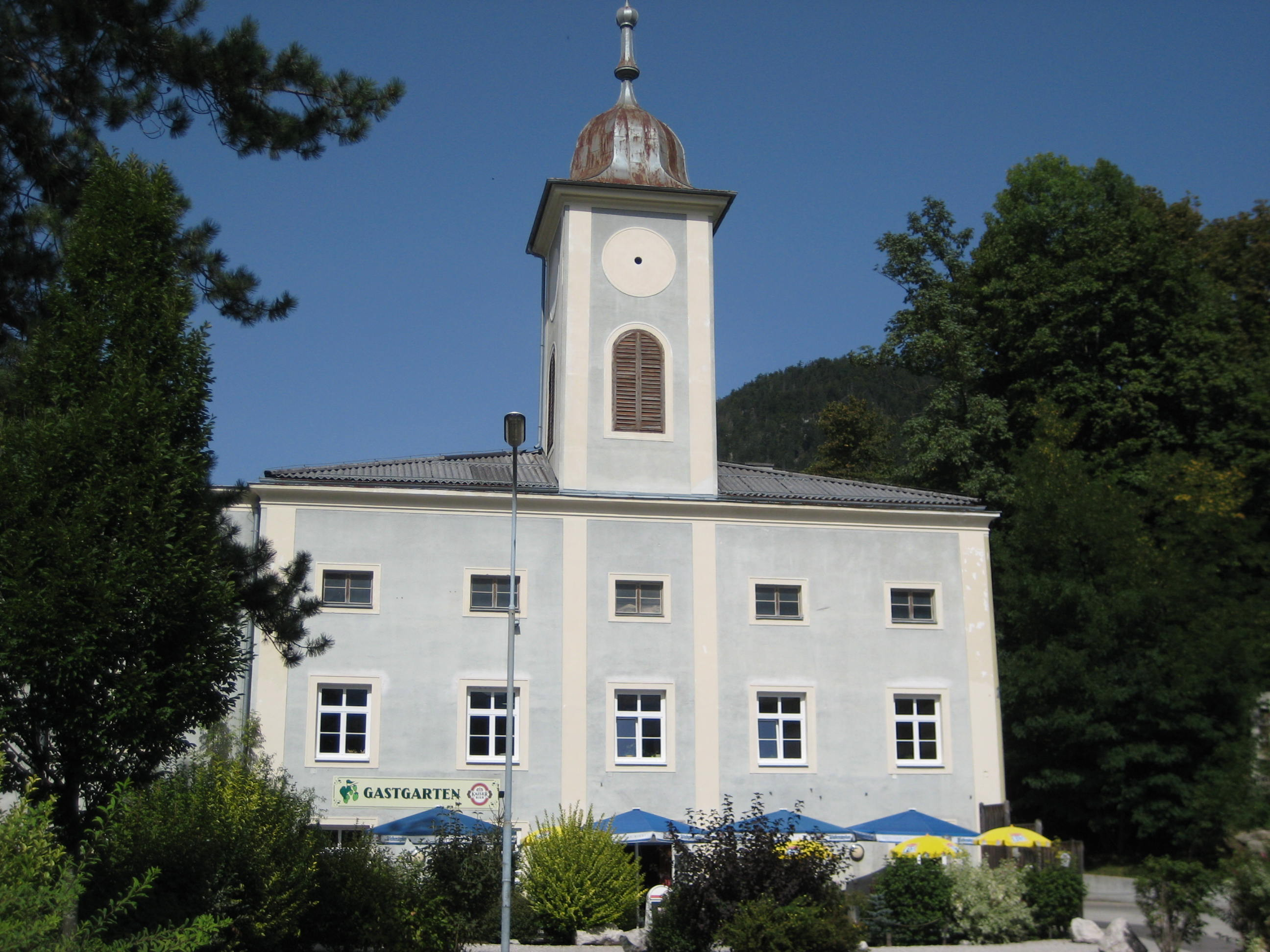 Ehemaliges Sudhaus in Bad Ischl, aufgenommen vom Weg an der Traun